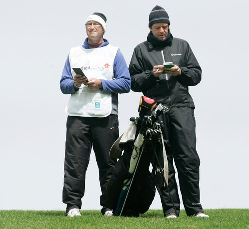 Rolf Muntz en zijn caddie besturderen het caddieboekje